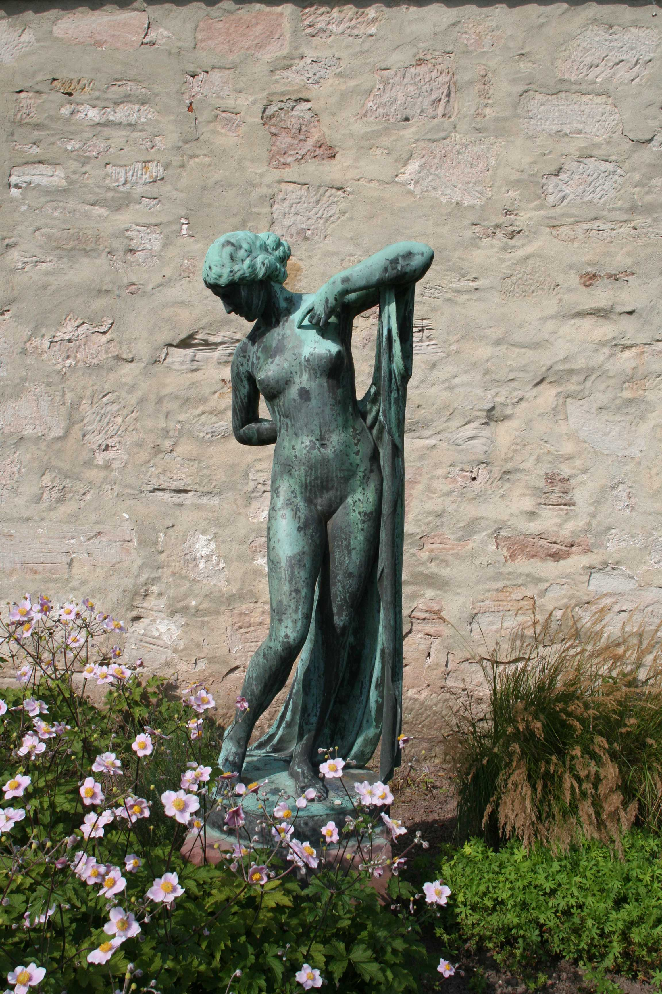 Phryne von Ferdinand Lepcke im kleinen Rosengarten des Coburger Hofgarten